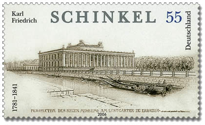 Briefmarke Karl Friedrich Schinkel; Motiv: Altes Museum in Berlin